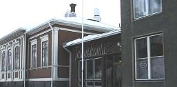 Kuopion talouskoulun päärakennus.